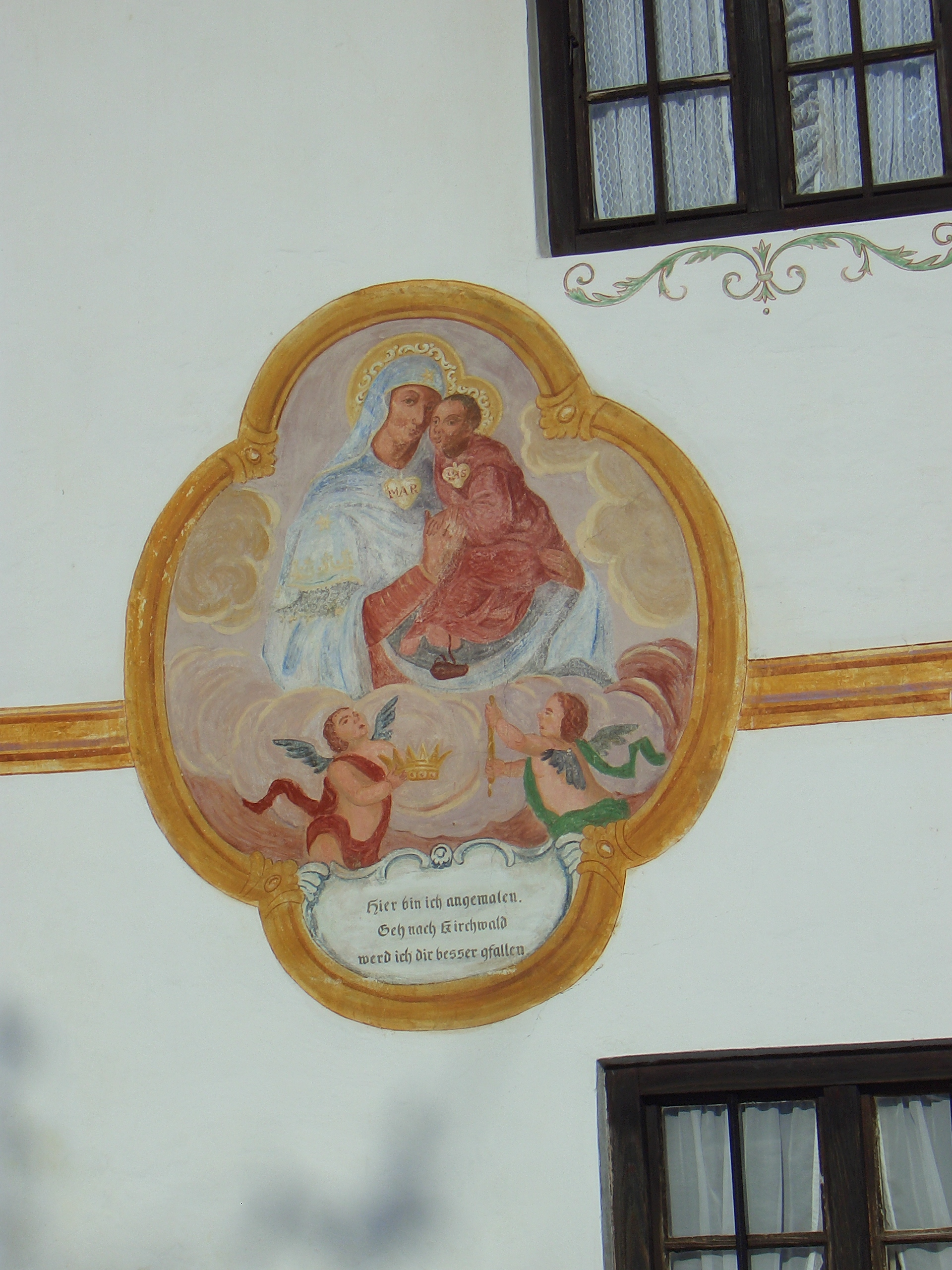 Lüftelmalerei an einem Bauernhaus in der Gritschen am Samerberg, Landkreis Rosenheim